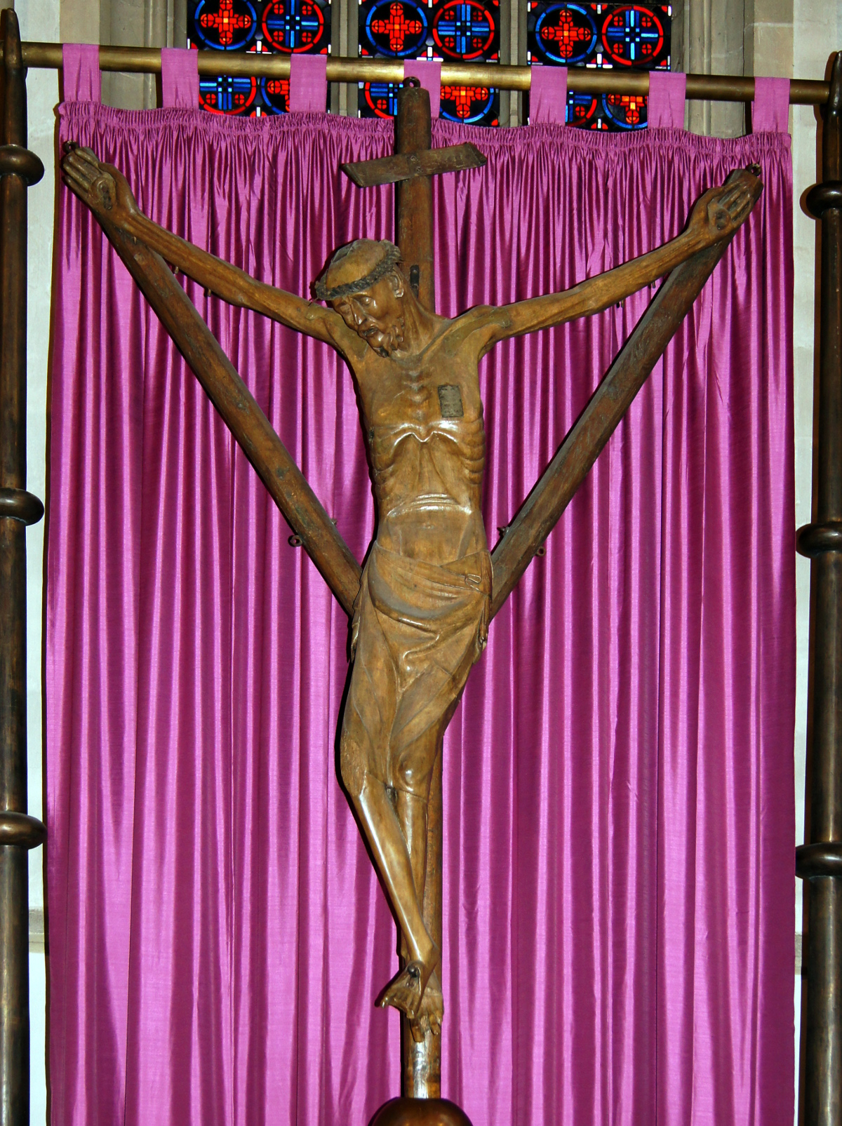 Das Coesfelder Kreuz, ein hölzernes Gabelkreuz aus dem frühen 14. Jahrhundert mit Kreuzreliquie, wird in der Pfarrkirche St. Lamberti in Coesfeld aufbewahrt. Es ist das größte Gabelkreuz Deutschlands und war über Jahrhunderte Anziehungspunkt für Wallfahrer.